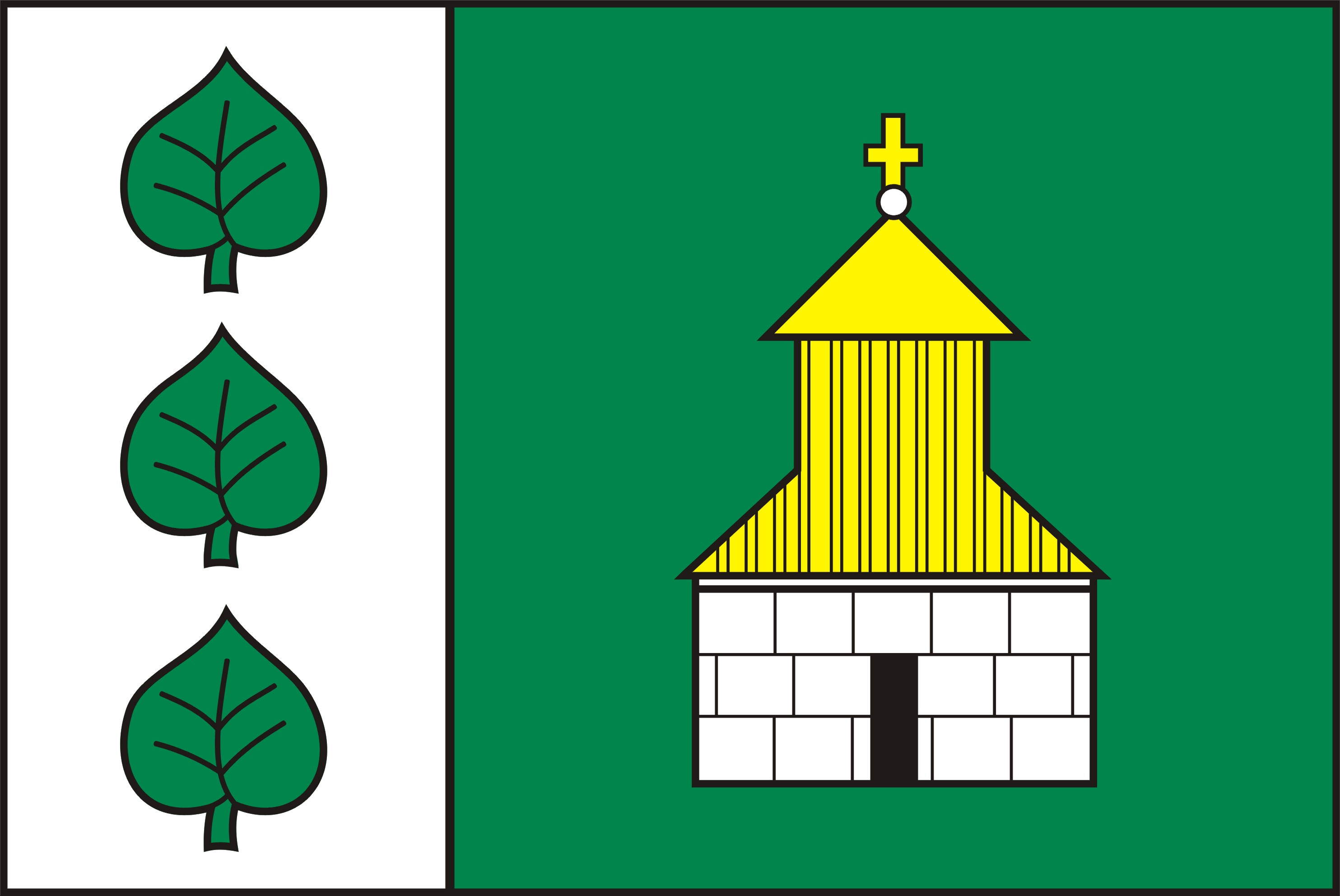 Vlajka obce Bolehošť